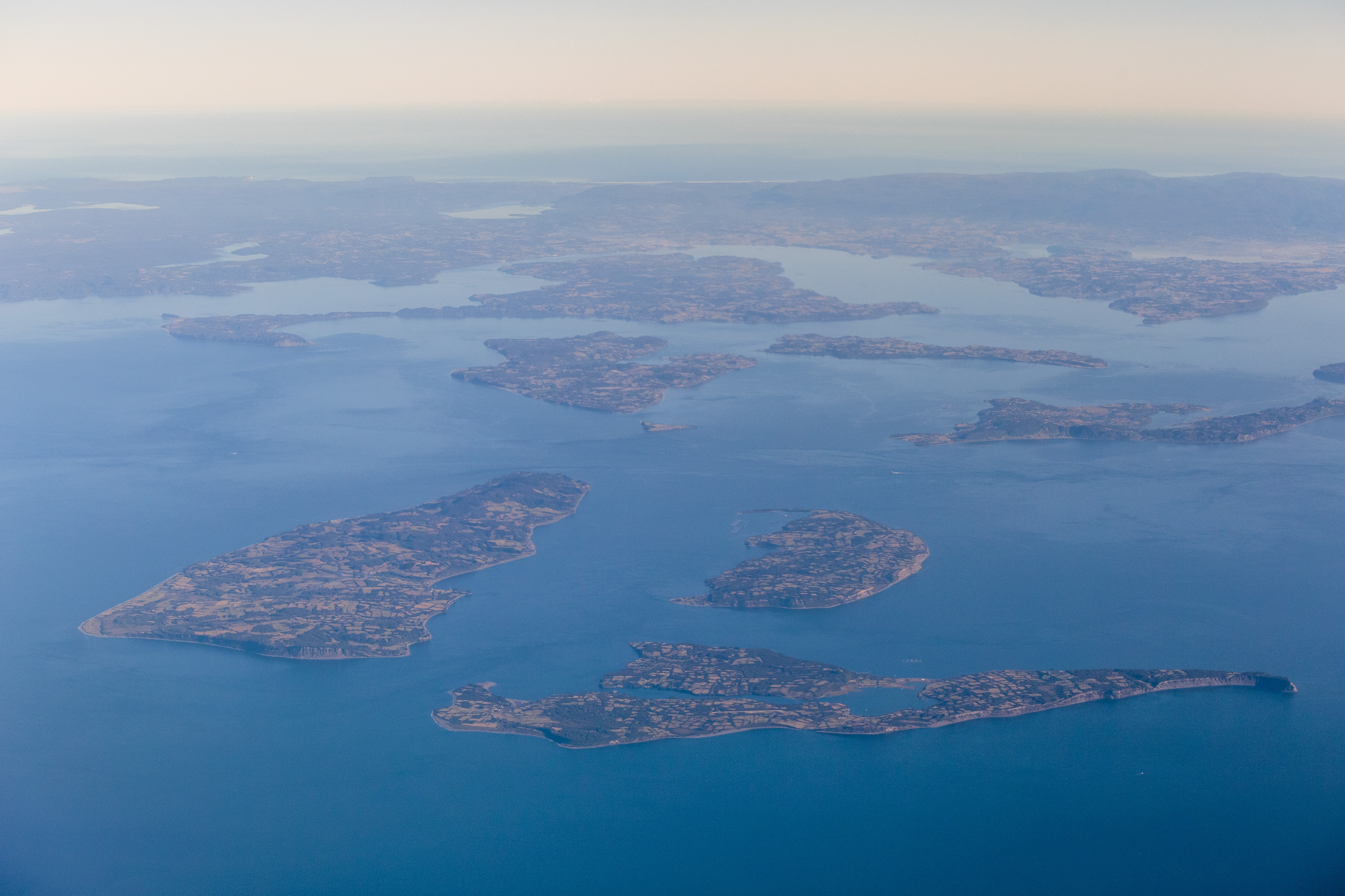 Islas Chaulinec, Alao y Apiao, archipiélago de Chiloé.